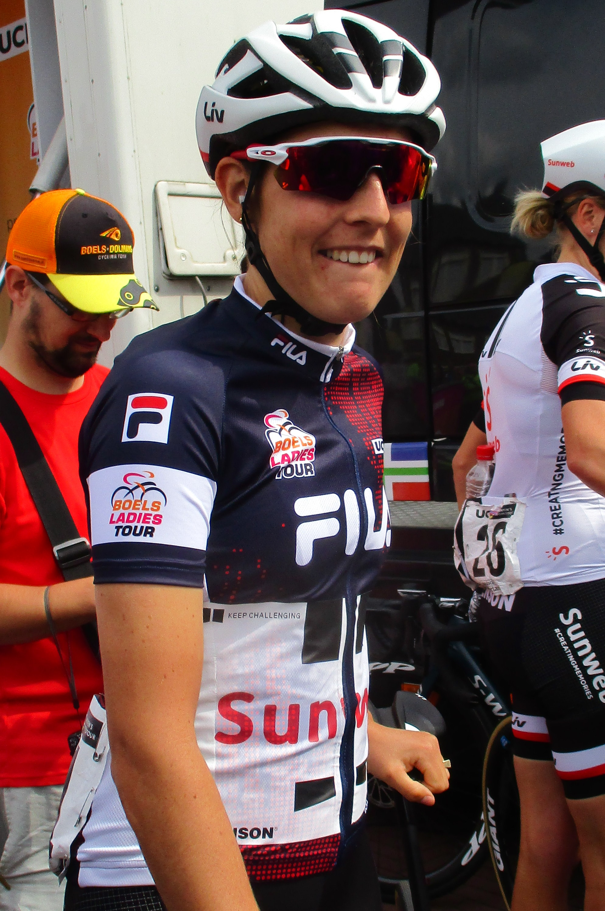 4e etappe van de Boels Ladies Tour 2018 door Noord-Limburg, start in Stramproy.